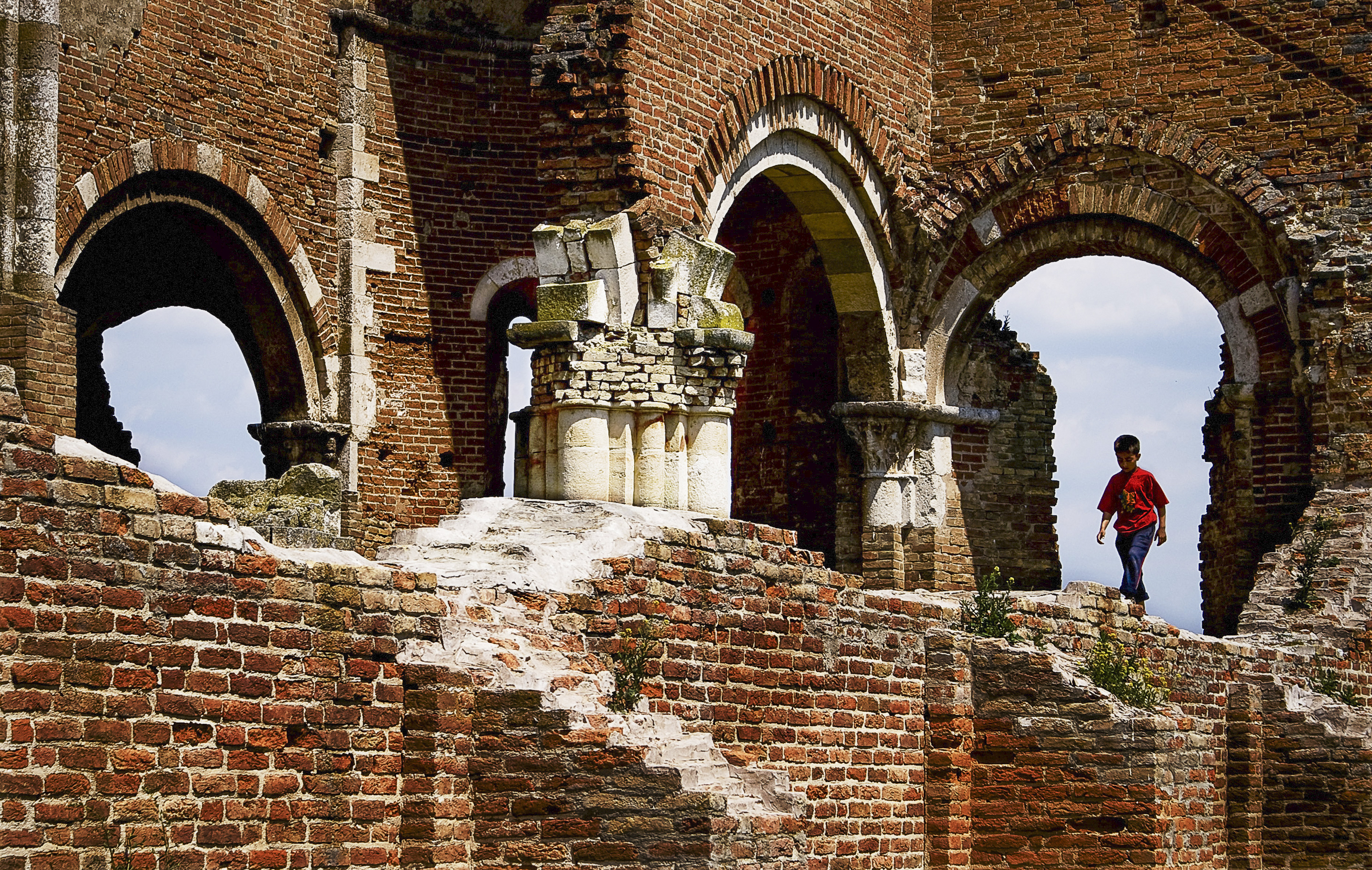 Arača je srednjevekovna crkva u blizini Bašaida, sela u kome živim.